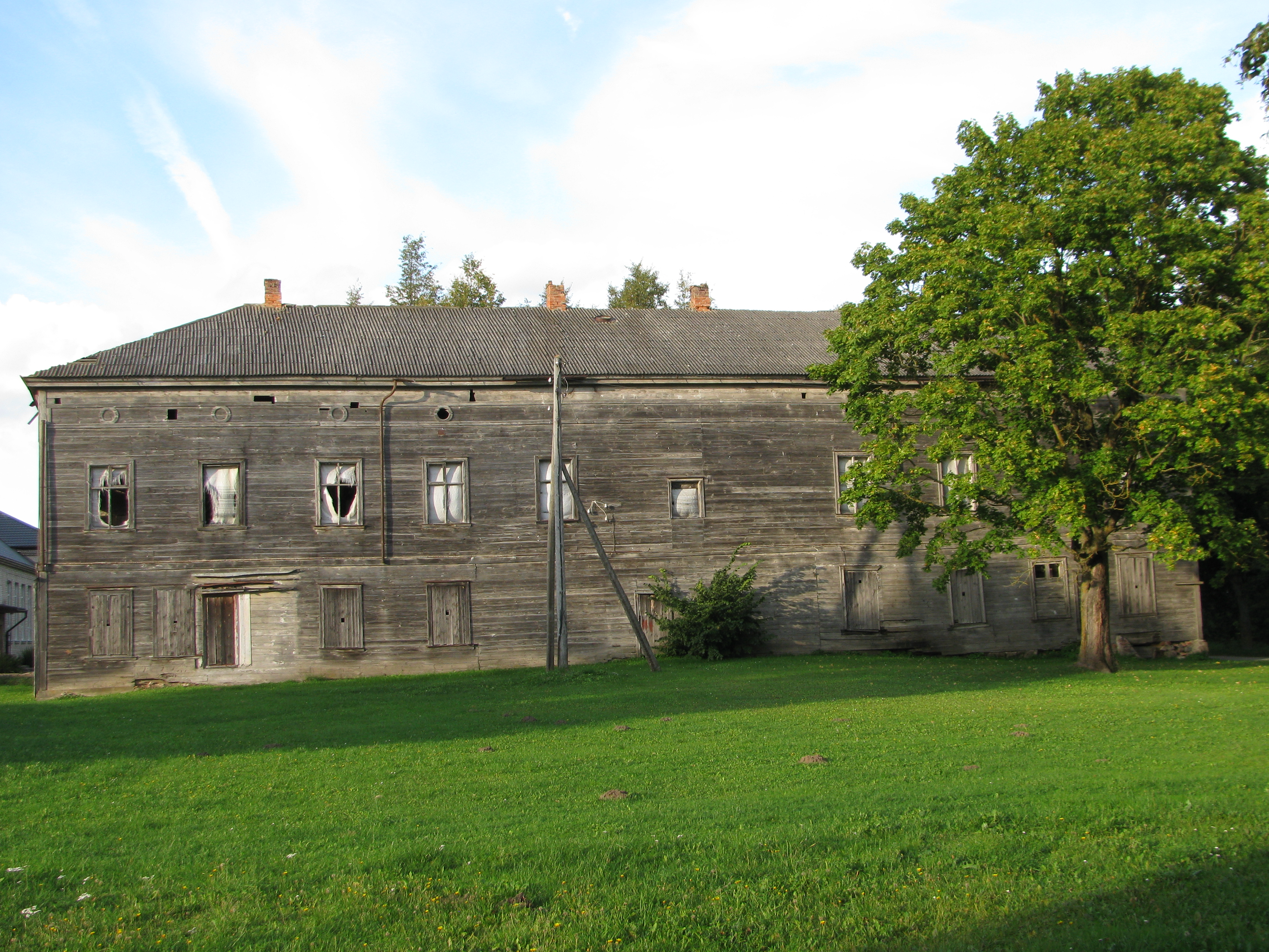 Bērvircavas muižas kungu māja un parks, Bērvircava